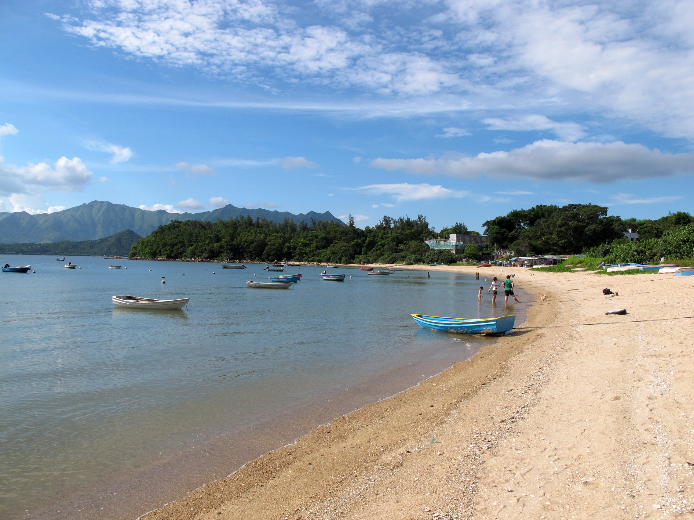 To Tau